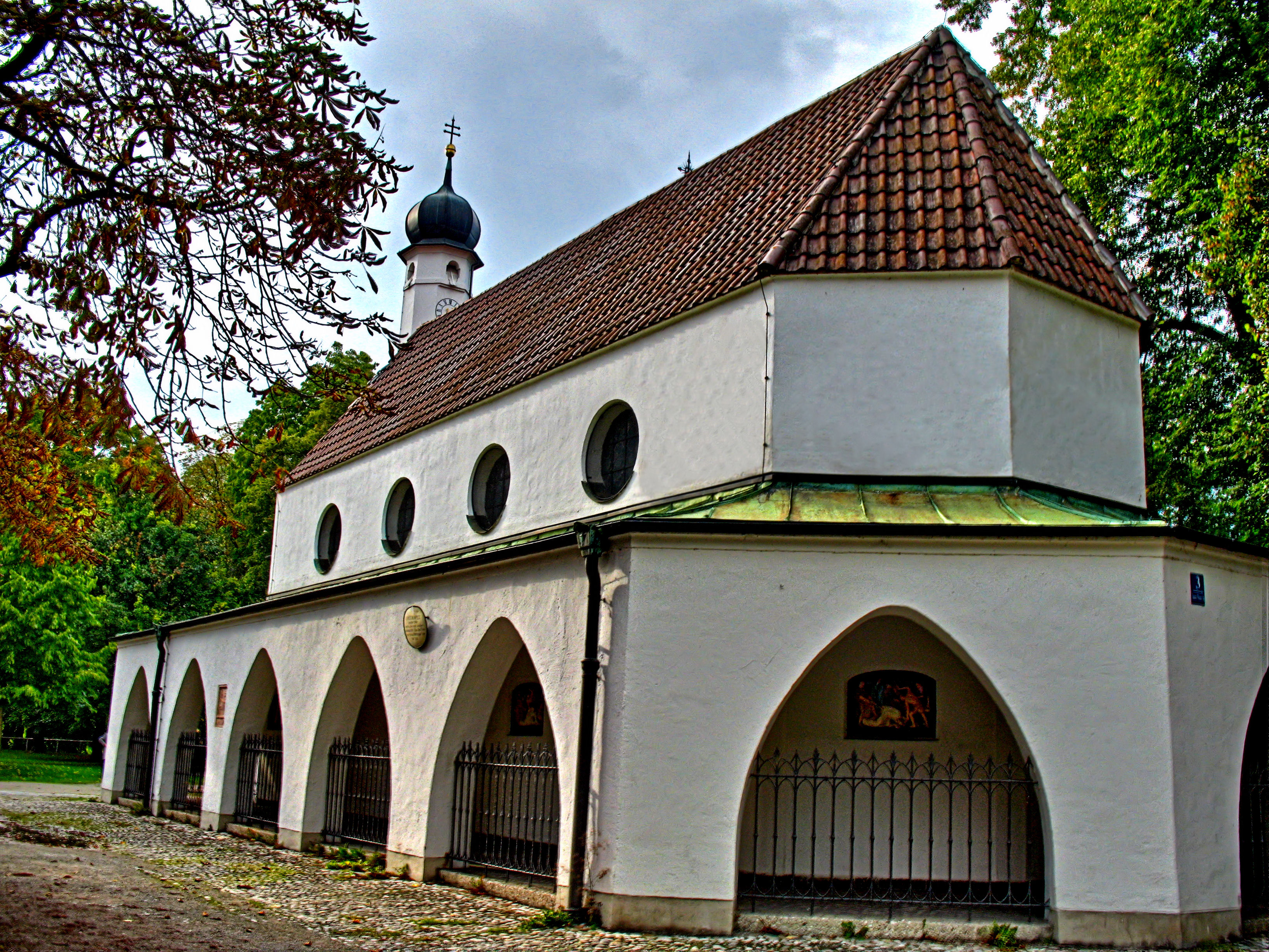 Altöttinger Kapelle bei St. Nikolai am Gasteig, München-Haidhausen (HDR-Aufnahme)